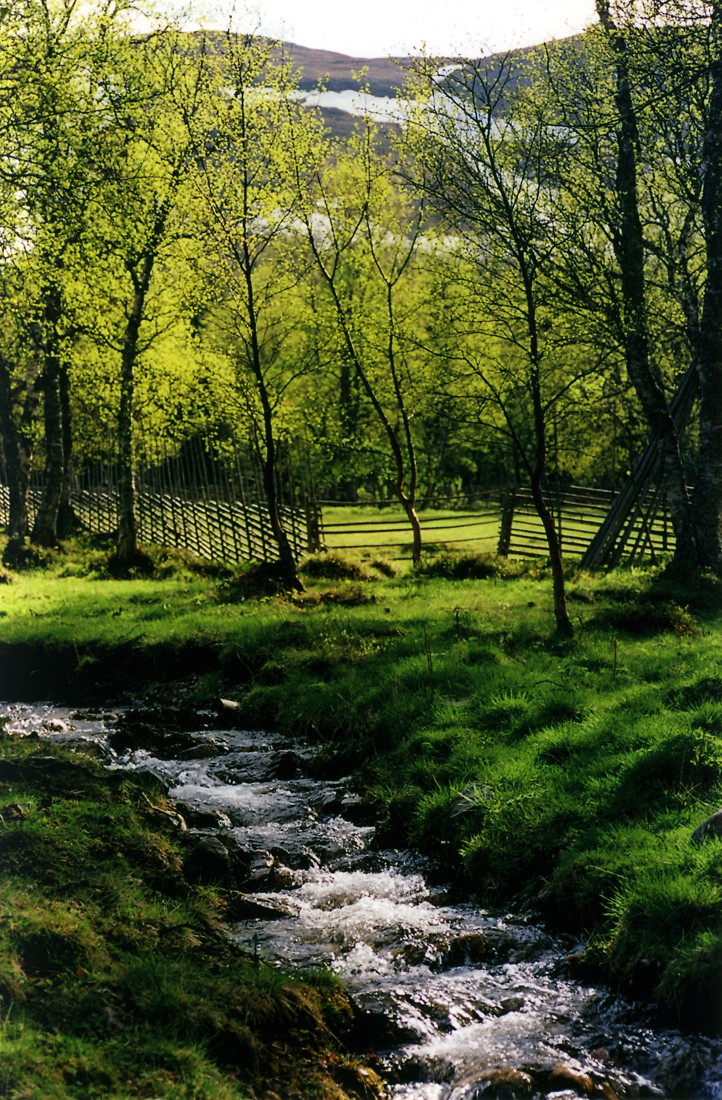 En bäck vid Nyvallens fäbodvall invid Sonfjället i Härjedalen.